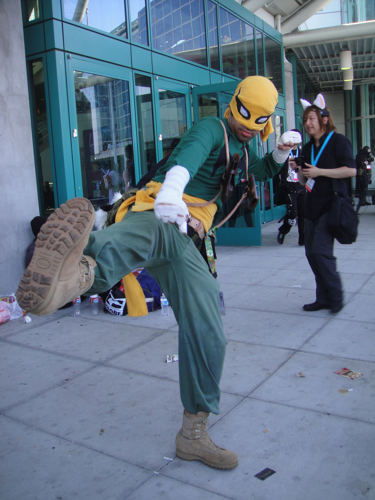 Anime Expo 2012